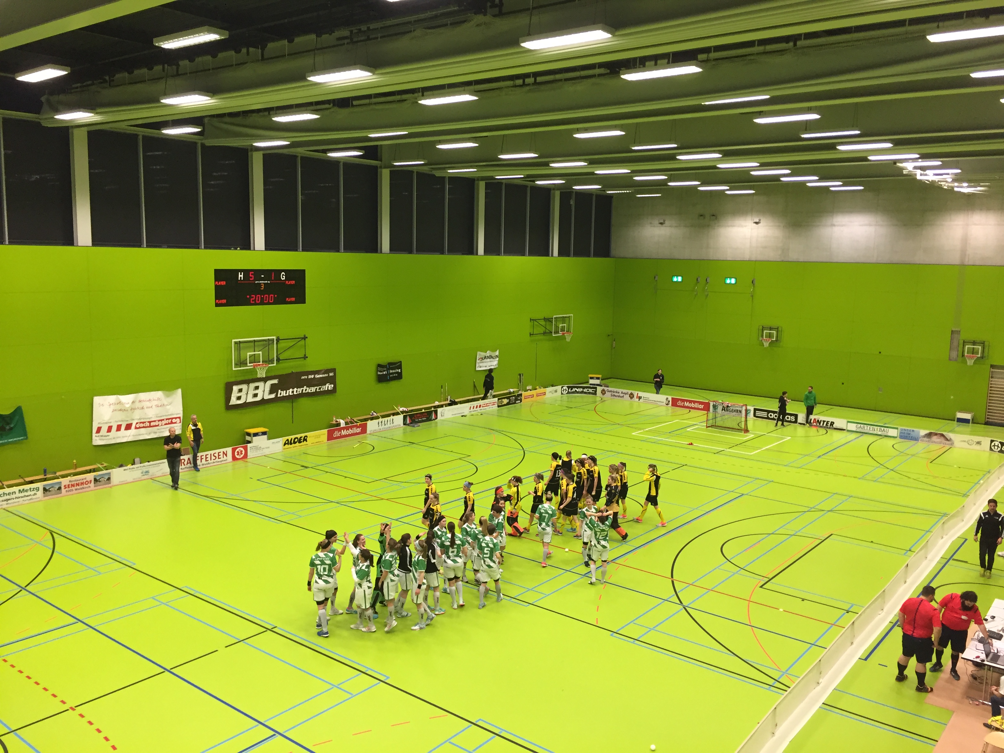 Damen NLB Playoff-Viertelfinal